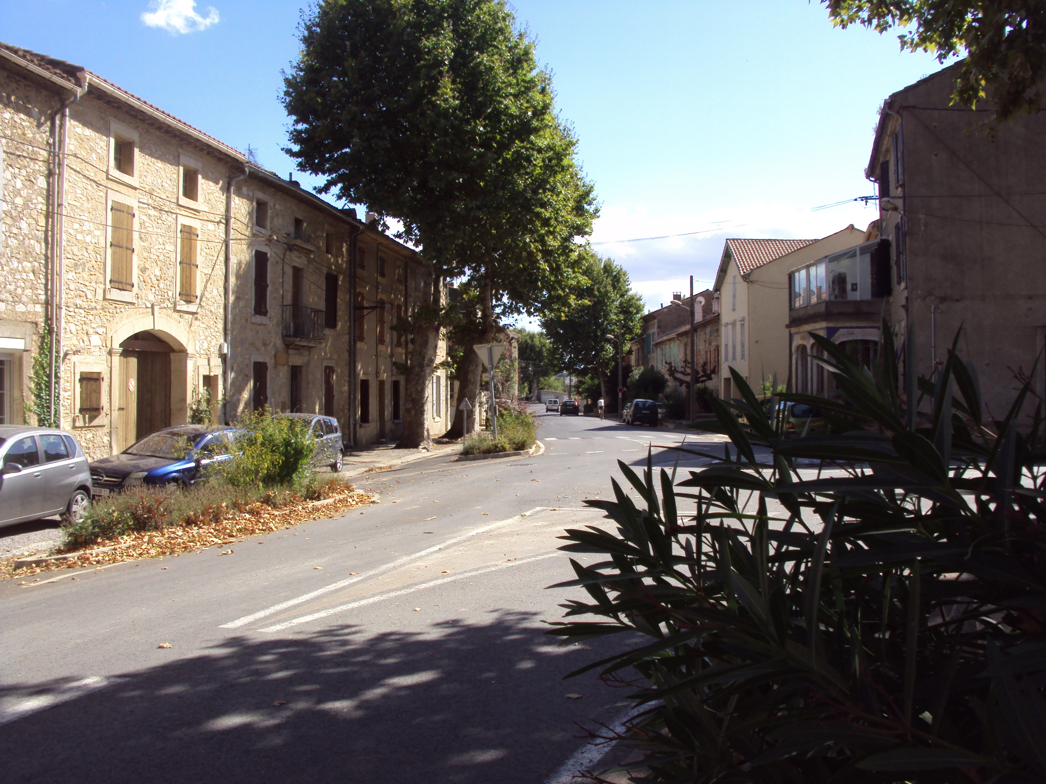 Avenue de la Gare à Bize-Minervois (Aude, France)